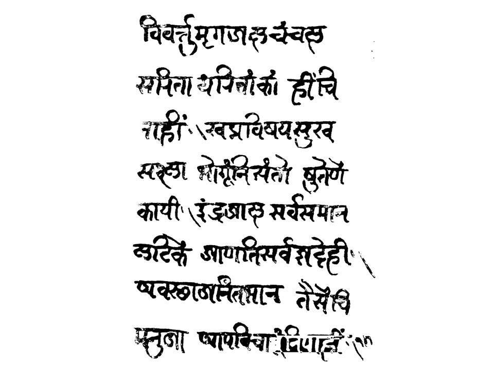 Marathi Handwriting By Kavi Dasopant Year 1530(approx)